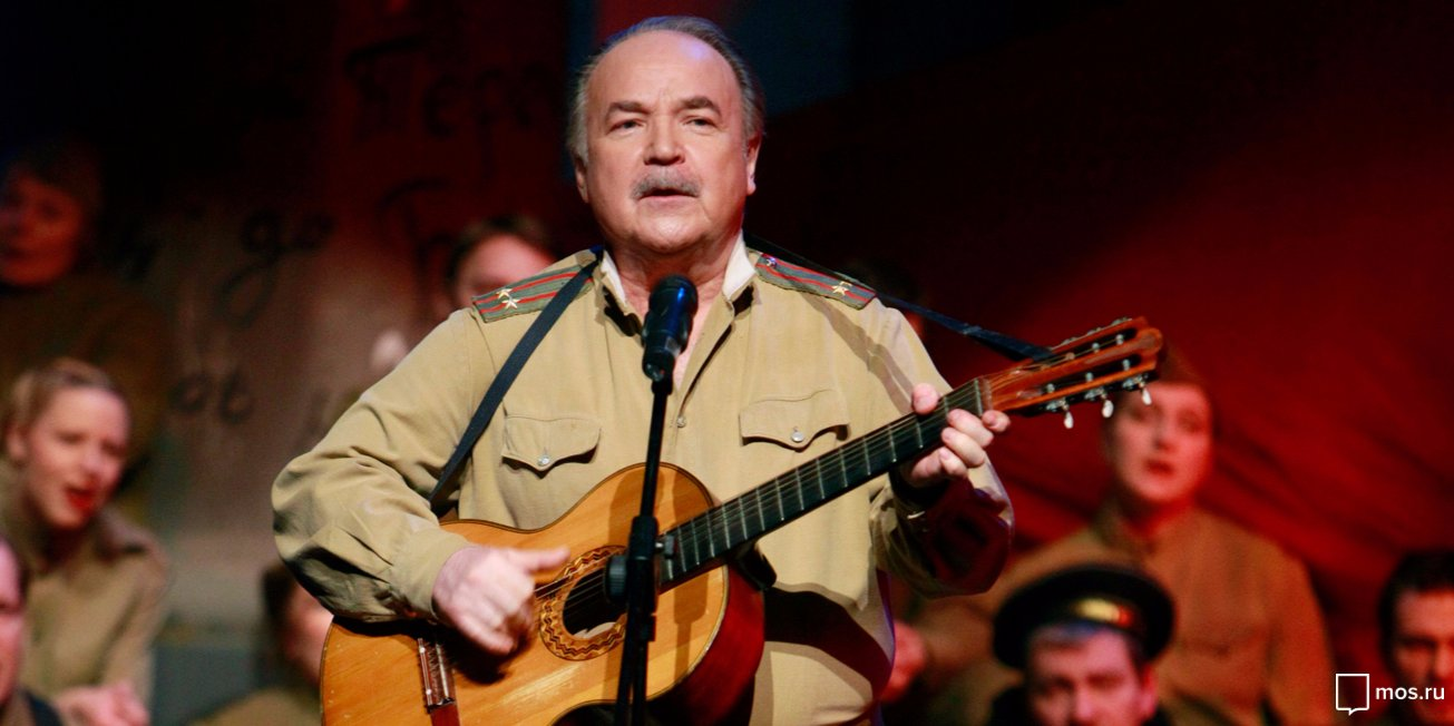 Народный артист РСФСР Николай Губенко в спектакле театра «Содружество актёров Таганки» «Четыре тоста за Победу»